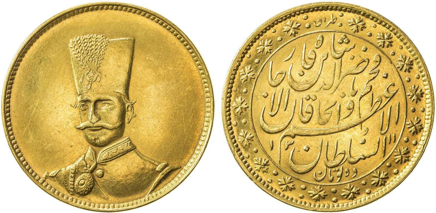 سکه ده تومانی ناصرالدین شاه